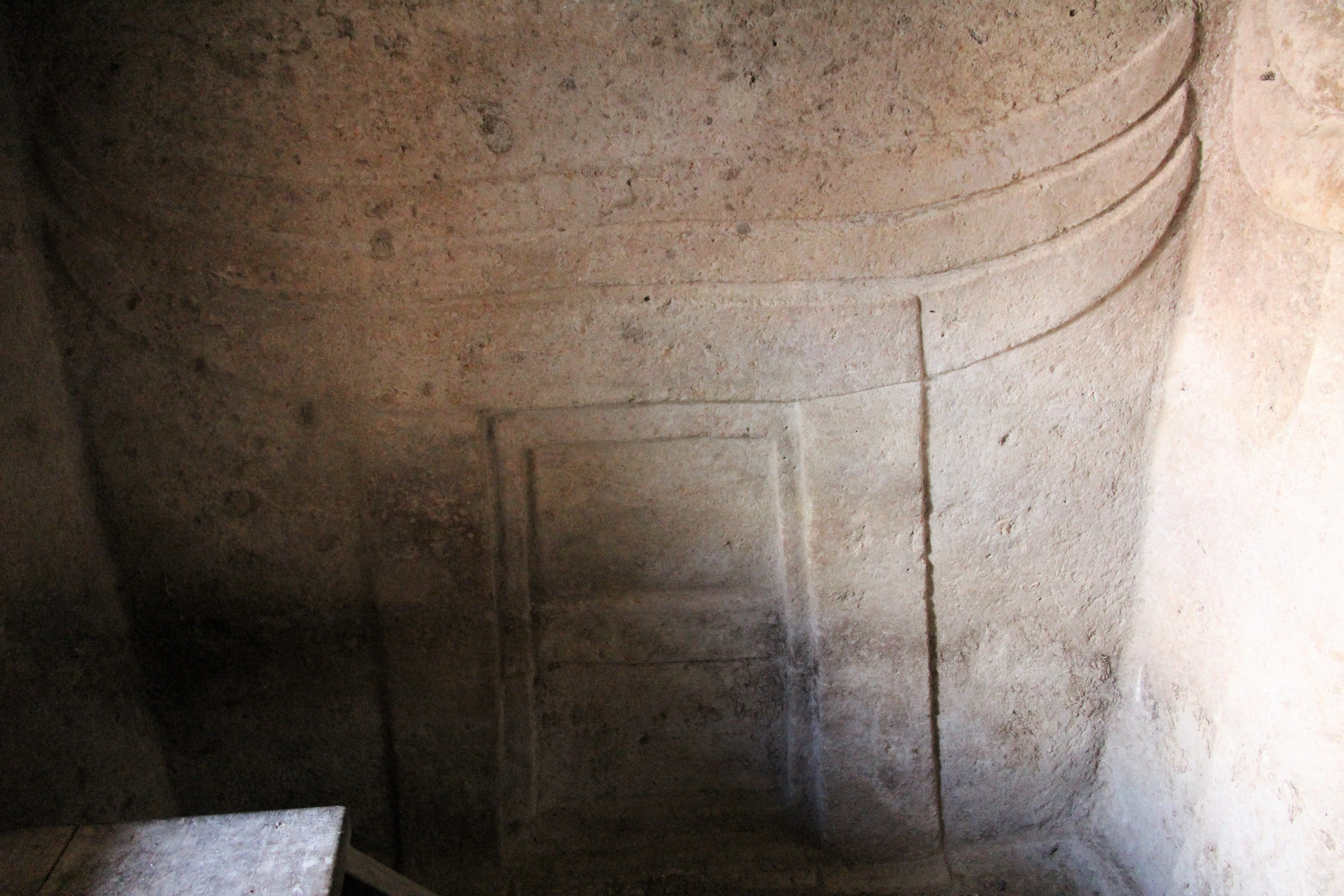 Putifigari, necropoli di Monte Siseri